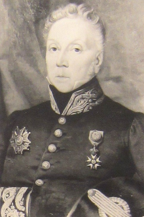 Description Gilbert-Jean-Baptiste Dufour Date21 September 2011Sourcehôtel du département de la MoselleAuthorAimelaimePermission (Reusing this file) Gilbert-Jean-Baptiste Dufour